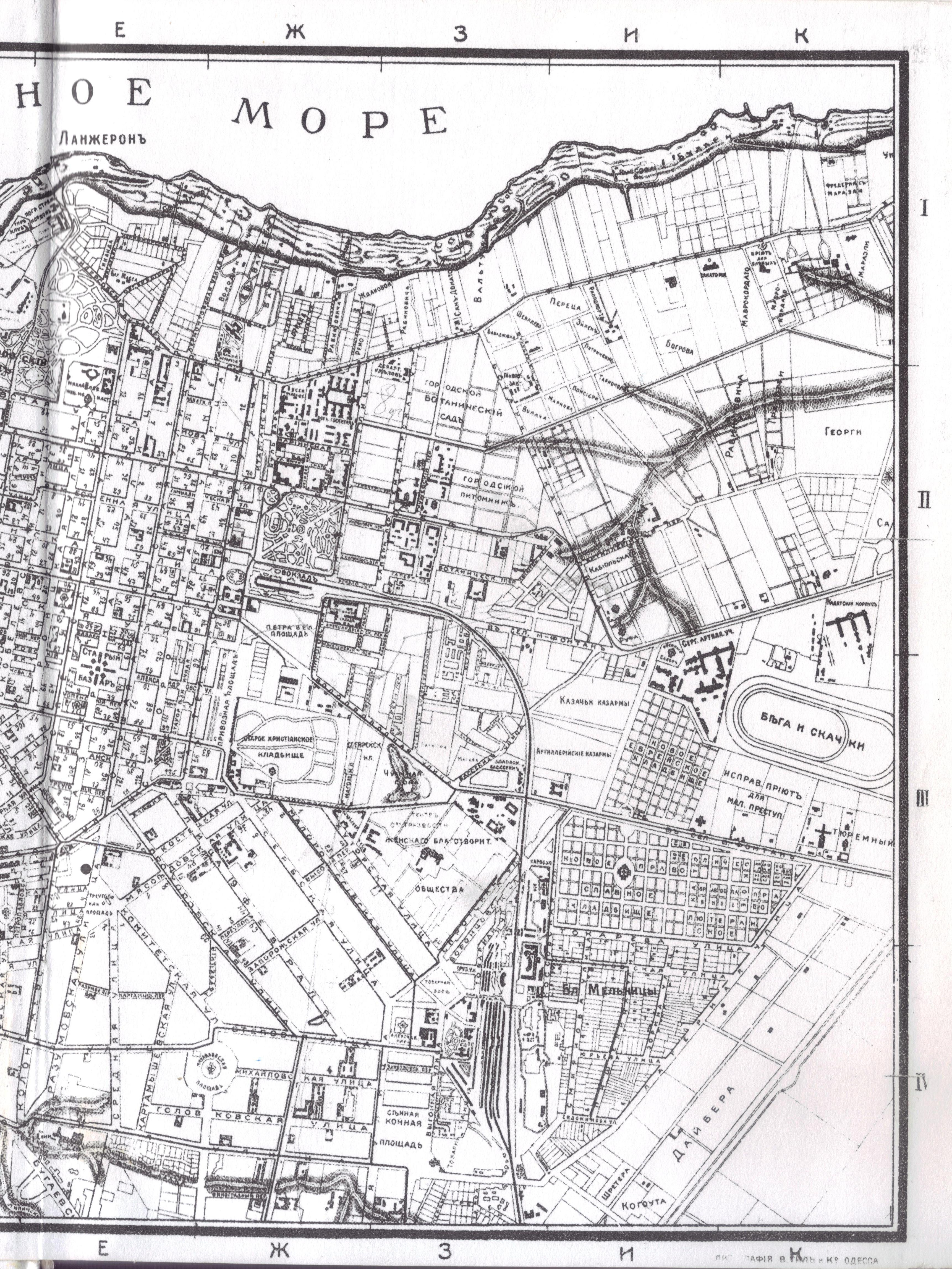 План города Одессы 1919 года, правая часть (Ланжерон, вокзал, ипподром, Привоз и др.). Масштаб в 1 дюйме - 200 саженей. Издание М. Фармаковской. Типография В. Тиль и Ко, Одесса.